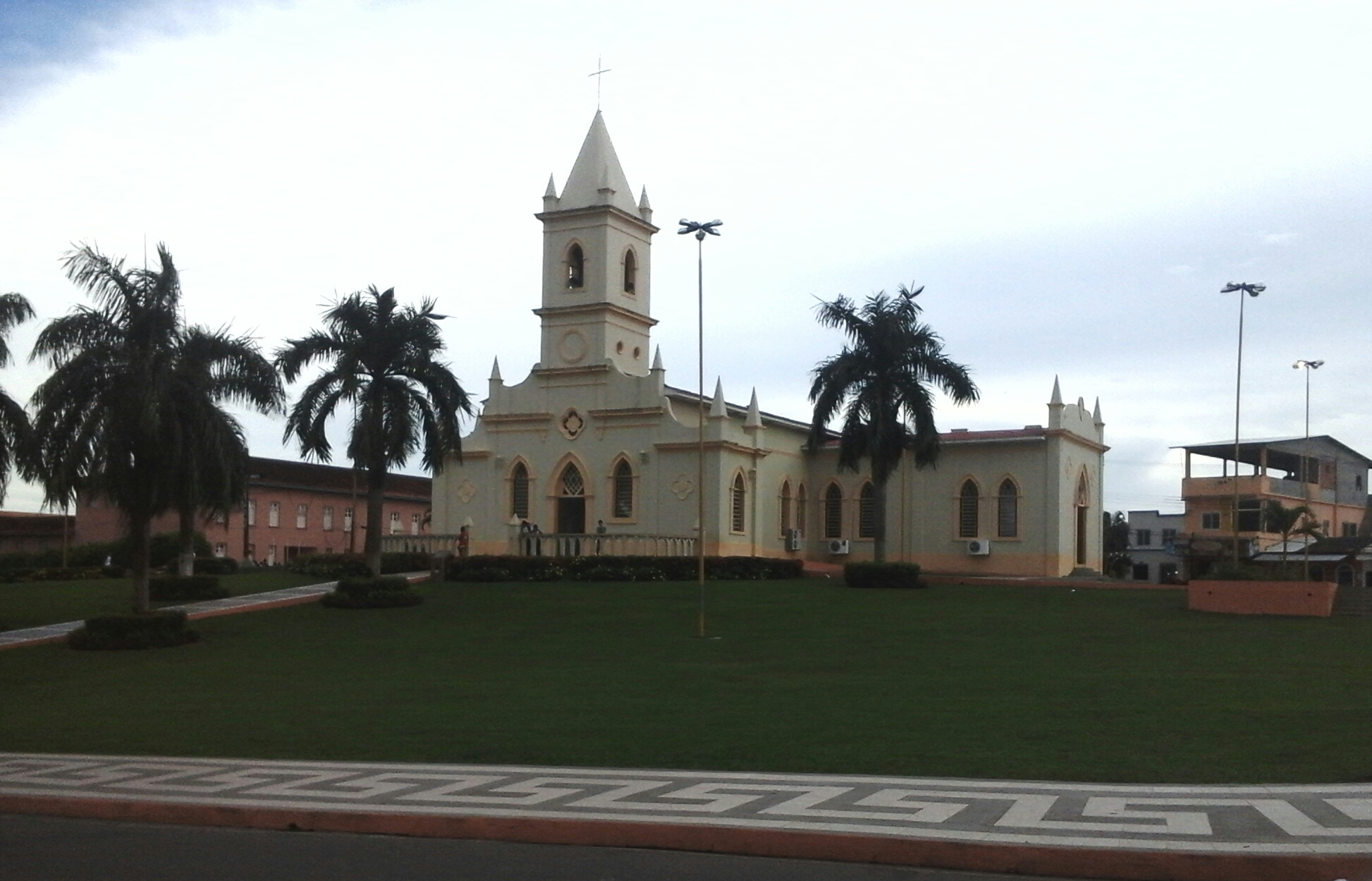 Igreja Matriz de Coari, Amazonas localizada na praça da cidade.